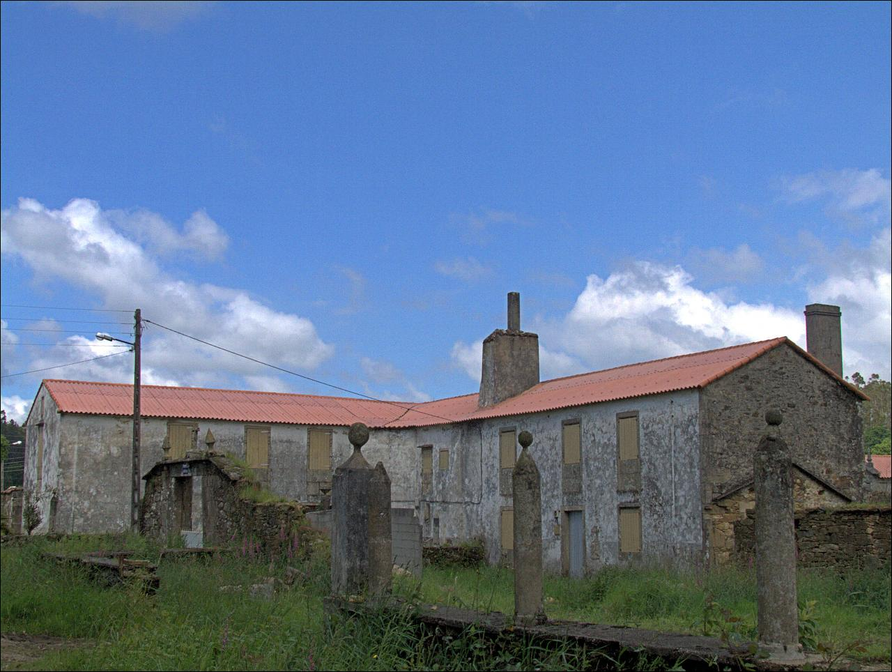 Pazo de Cañotas, na parroquia de Bembibre, concello do Val do Dubra (Provincia da Coruña, Galiza, Spain)